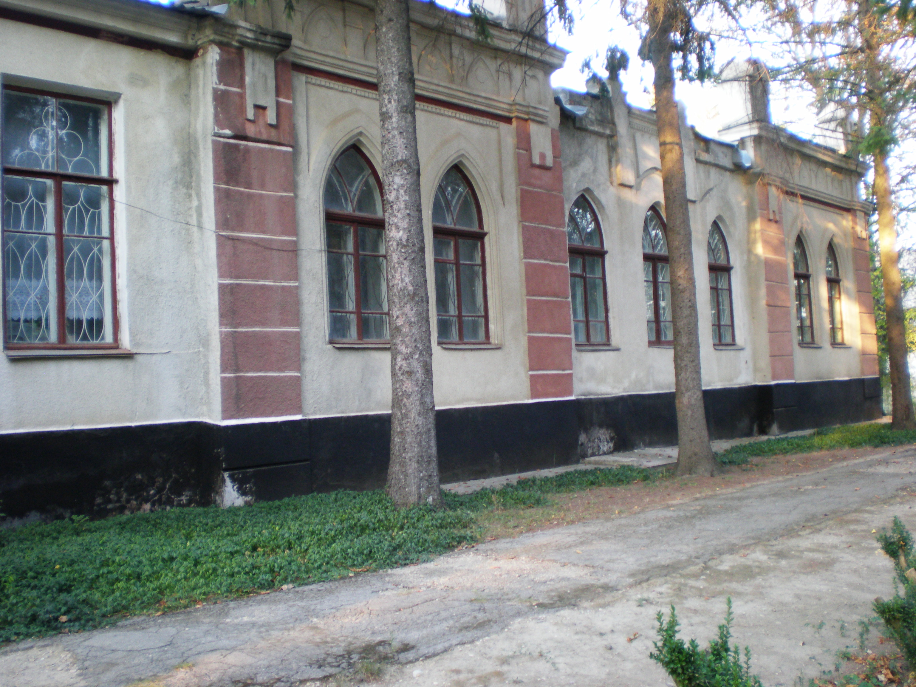 Kostotchkovka (Crimée, Ukraine) : Centre administratif, anciennement maison du négociant Araon Krym